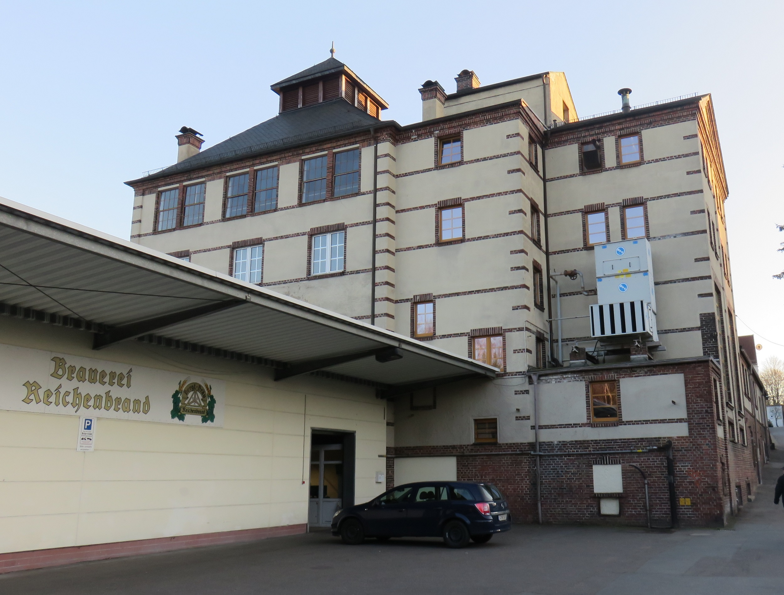 Brauerei der Reichenbrander Biere. Im Bild, Rückansicht. Brauerei und Gaststätte. Kulturdenkmal Chemnitz-Reichenbrand.